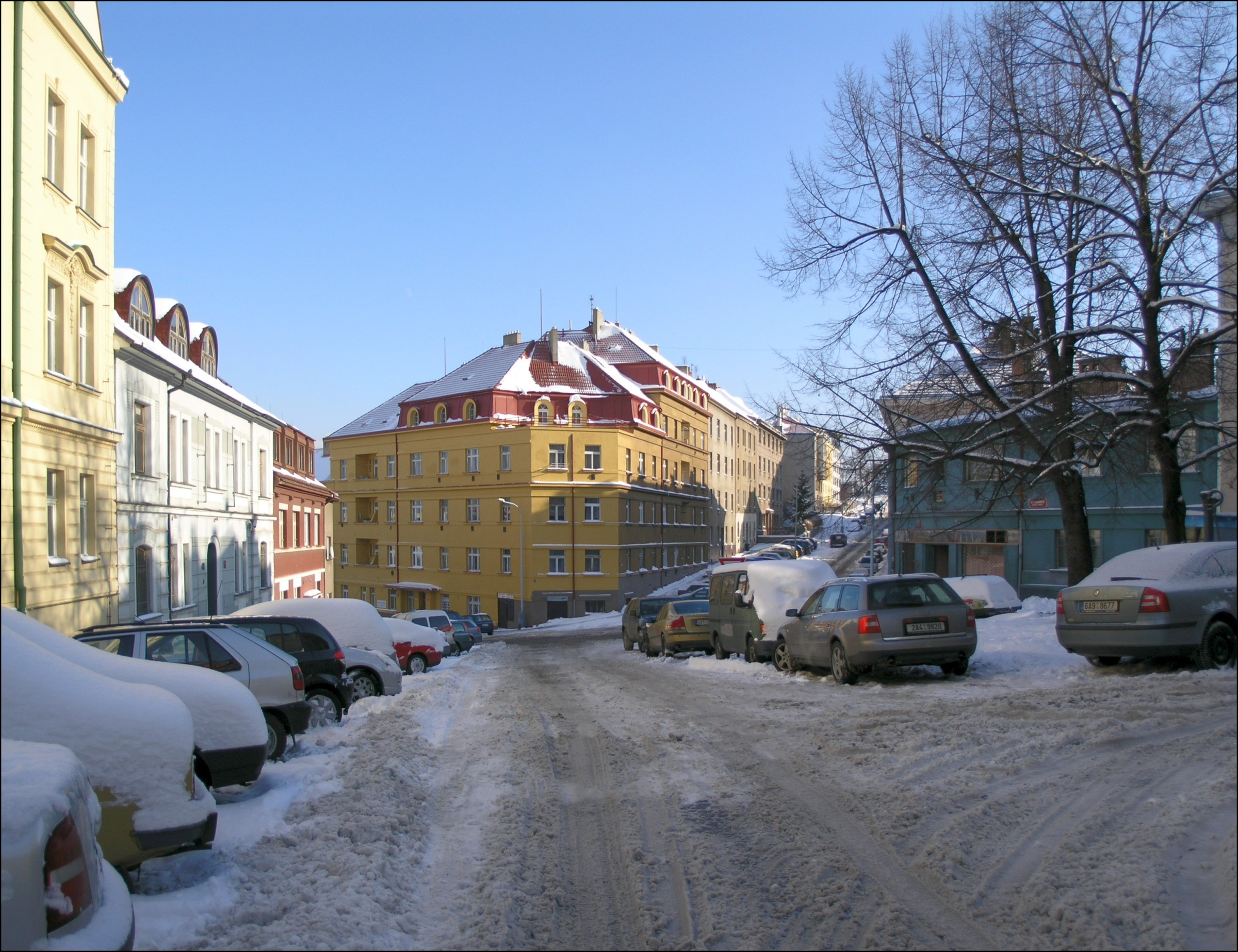 Česky: Praha, Břevnov - pohled ulicí Závěrka na dům na rohu ulic Za Strahovem a Nad Závěrkou